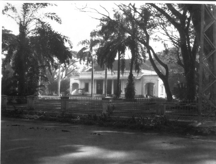 Foto. De residentswoning te Bondowoso, hoofdplaats van de residentie Besoeki, provincie Oost-Java